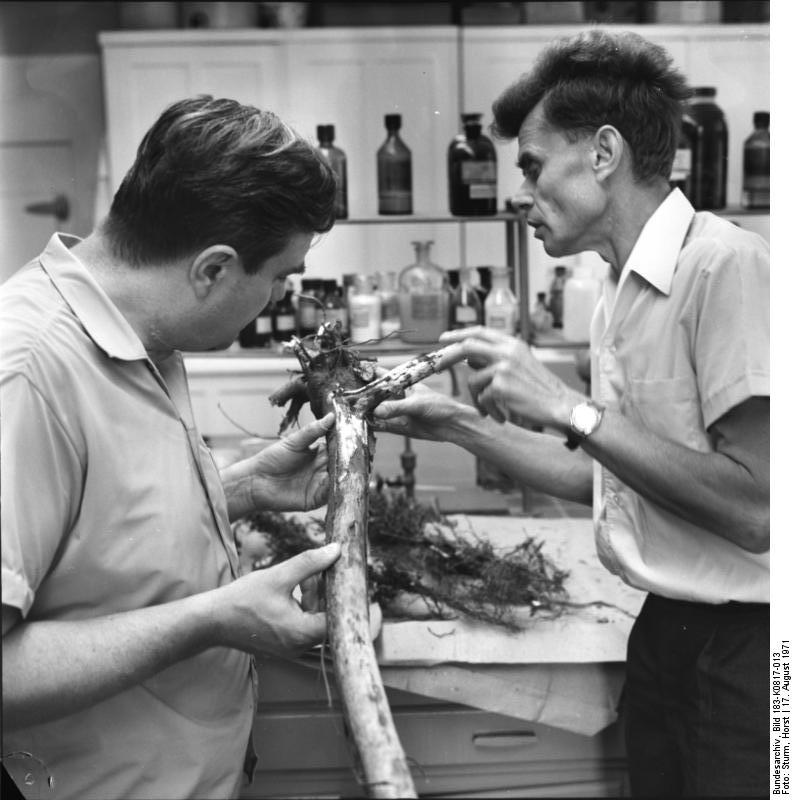 ADN-ZB/Sturm/17.8.1971 Umweltschutz in der Deutschen Demokratischen Republik, Die Volkskammer der DDR hat im Mai 1970 ein Landeskulturgesetzt beschlossen, dass die Grundlage für alle Maßnahmen bildet, die zum Umweltschutz in der DDR getroffen werden. Der Schutz der Natur, die rationelle Nutzung und der Schutz des Bodens, die Reinhaltung der Gewässer und der Luft, die Erhaltung der Pflanzen- und Tierarten und der landschaftlichen Schönheiten werden zur Pflicht des Staates und der Gesellschaft sowie auch zur Sache jedes Bürgers erklärt. Das Eberswalder Institut für Forstwissenschaft (DDR-Bezirk Frankfurt/O.) bemüht sich vor allem um vorbeugende Maßnahmen zur Gesunderhaltung der Wälder und befaßt sich deshalb speziell mit der Erforschung von Baumkrankheiten. Auf unserem Photo untersuchen Wissenschaftler dieses Instituts einen vom Hallimasch-Pilz befallenen jungen Ahorn-Stamm. Hallimasch ist der größte Holzzerstörer. [II. TEXT] ADN-ZN/Sturm/17.8.1971 Eberswalde (Bez. Frankfurt/O) Forstwissenschaft zur Gestaltung einer sozialistischen Landeskultur Zur "Woche der sozialistischen Landeskultur 1971", die vom 29.8. bis 4.9.1971 in der DDR durchgeführt wird, kann das Eberswalder Institut für Forstwissenschaft der Deutschen Akademie der Landwirtschaftswissenschaften über gute Forschungsarbeiten berichten. Prof. Dr. Ulrich Sedlag (r) leitet die Abteilung Forstschutz, in der sich die Wissenschaftler besonders um vorbeugende Maßnahmen zur Gesunderhaltung der Wälder bemühen. Speziell der Erforschung von Baumkrankheiten widmet sich Dr. Waldfried Kessler (l), deswegen ist für ihn ein von Hallimasch befallener junger Ahorn-Stamm ein gutes Objekt, den größten Holzzerstörer unter die Lupe zu nehmen.